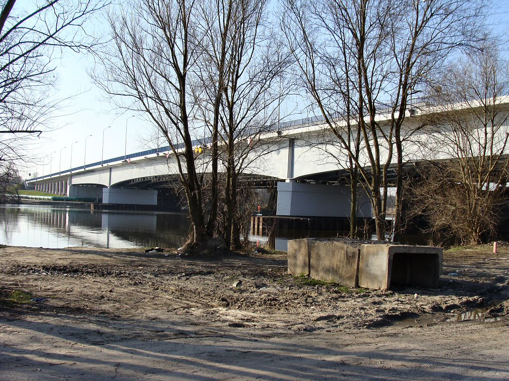 Most Gryfitów w Szczecinie